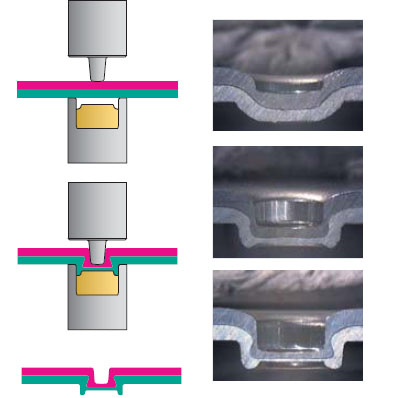 przekroj punktu powstalego podczas toxowania